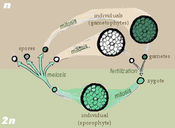 מיוזה ספורית